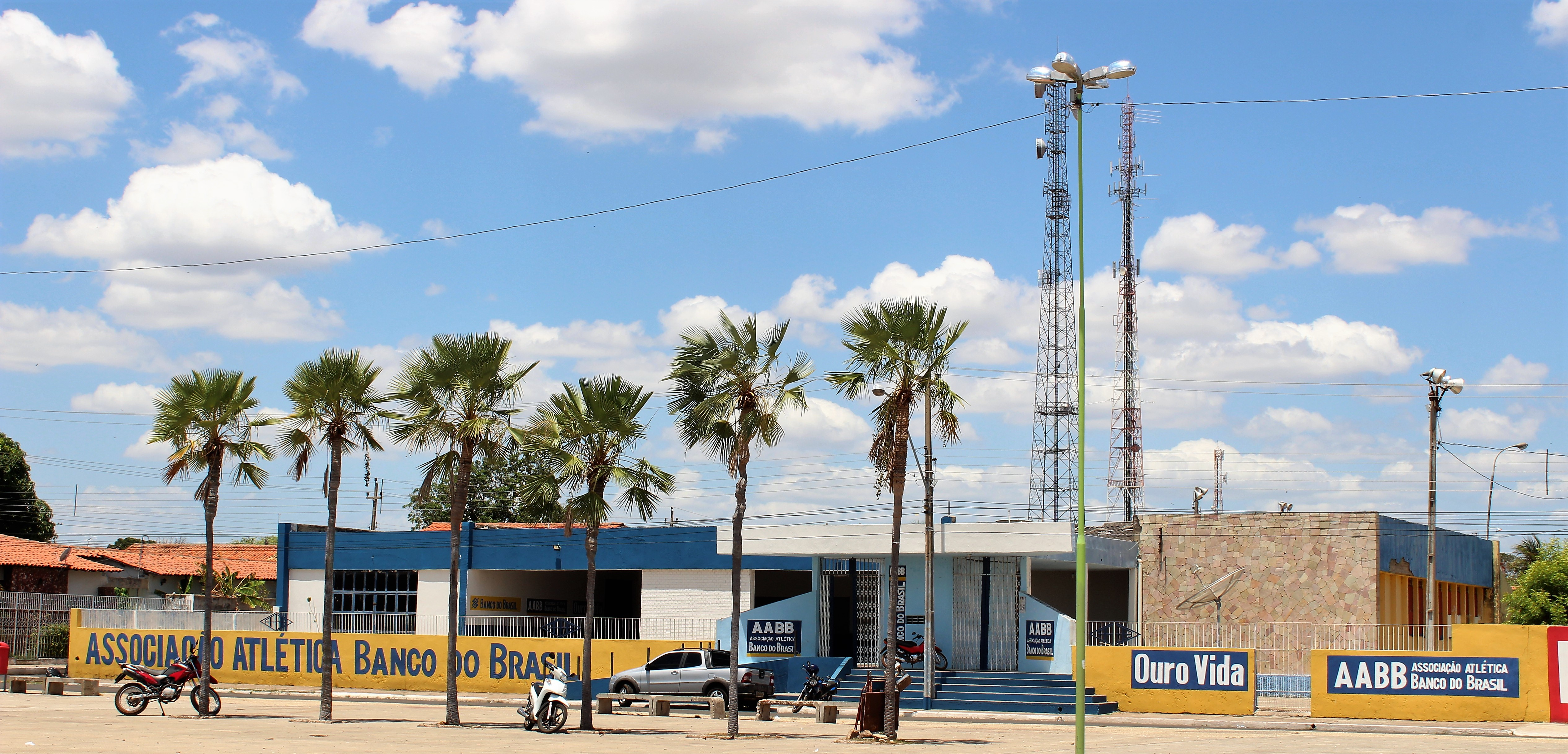 AABB da cidade de Campo Maior, fica numa das praças da beira do açude que tem no centro da cidade.